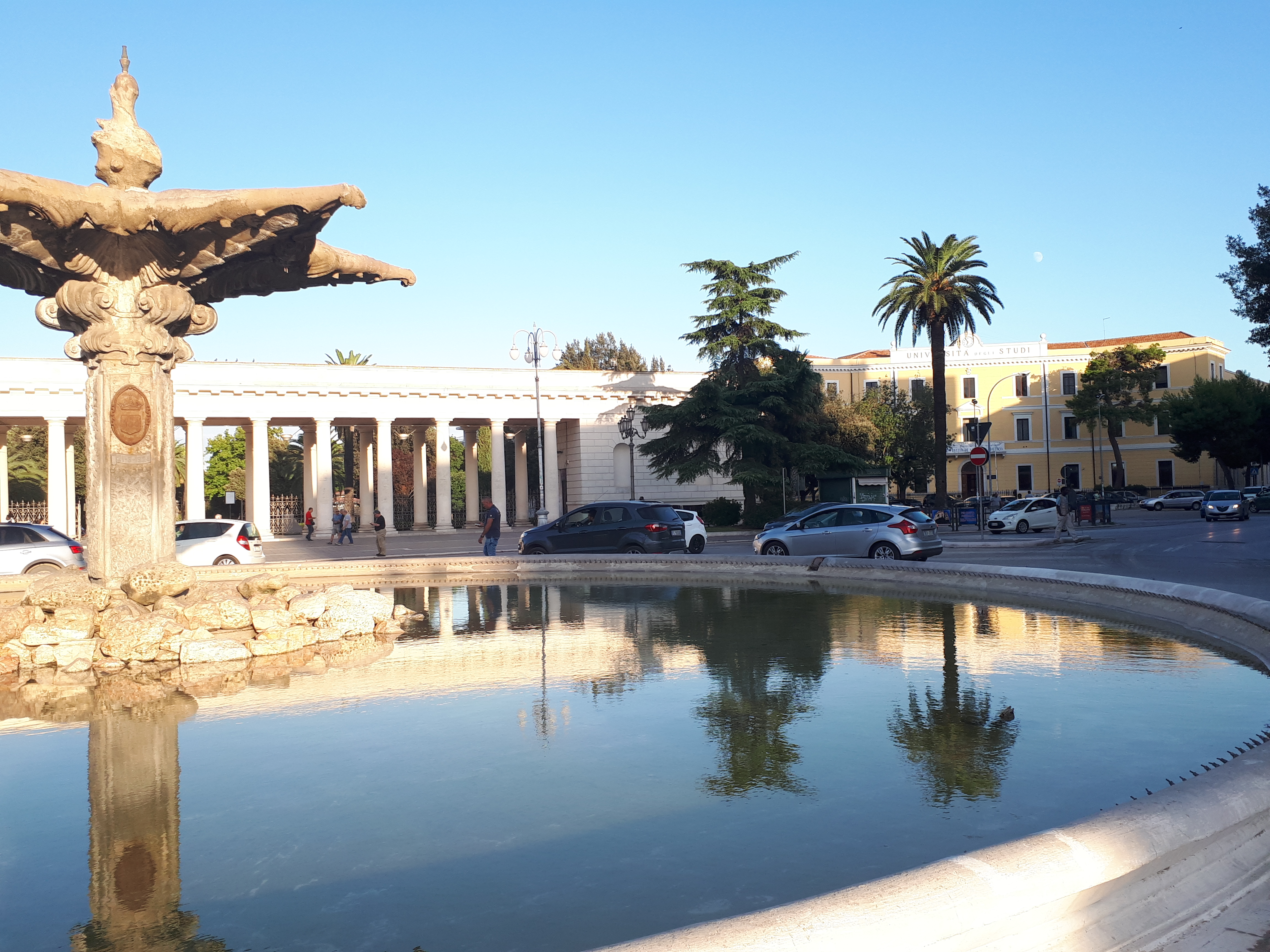 La Fontana del Sele, rappresenta l'acqua a servizio dei cittadini, proveniente dalle fonti del Sele.